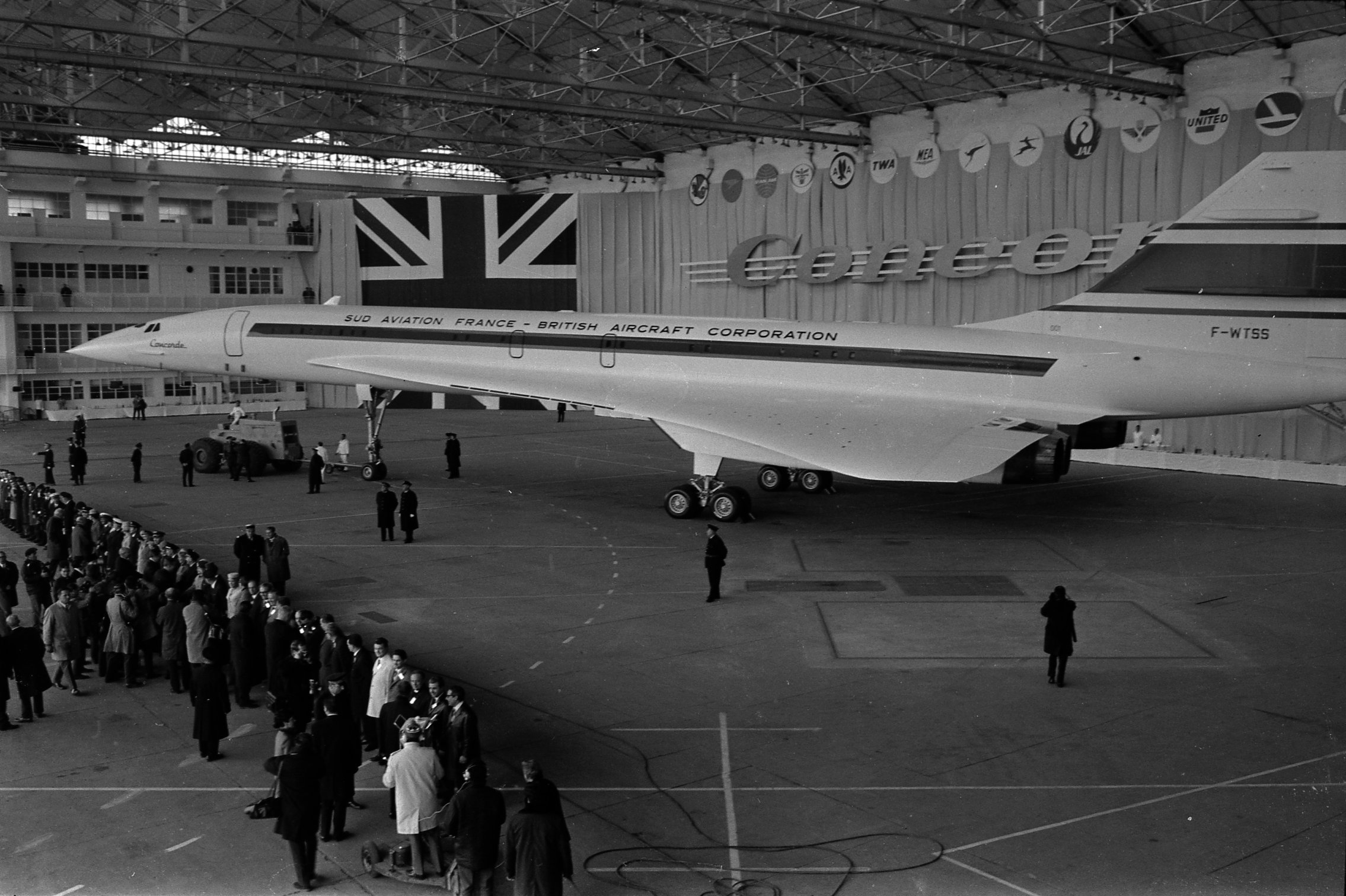 Ateliers Sud Aviation (Saint-Martin-du-Touch). 11 décembre 1967. Vue d'ensemble en plongée des représentants et personnels des compagnies (commandants de bord, hôtesses) ayant mis une option sur le Concorde posant alignées devant le Concorde, journalistes ; au 2nd plan vue d'ensemble du Concorde ; en arrière-plan drapeau britannique étendu sur un pan de mur, logos des différentes compagnies accrochés en haut du mur. Cliché pris lors de la présentation officielle du prototype français du Concorde.